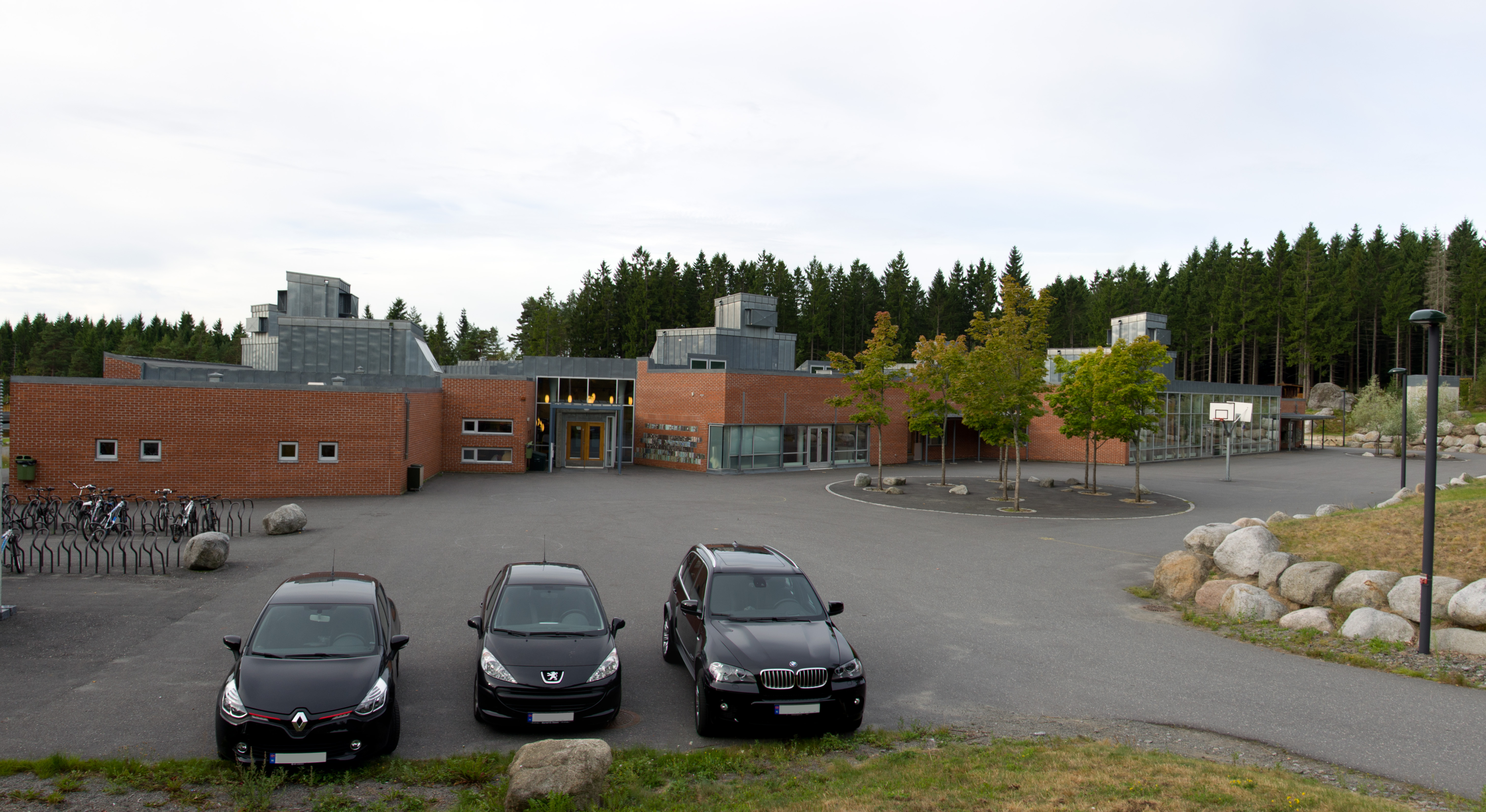 Ra ungdomsskole i Larvik